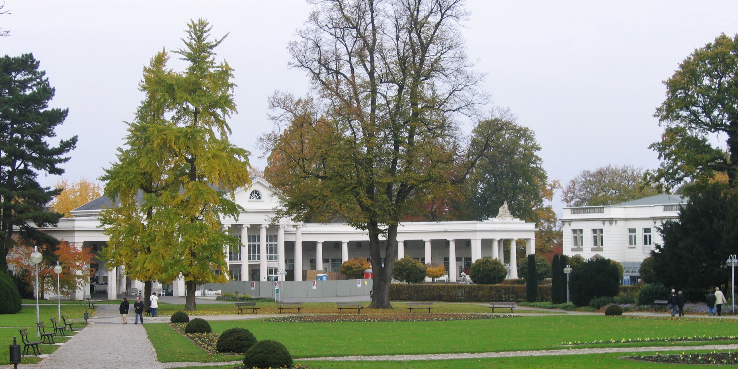 Kurpark